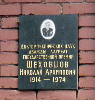 д.т.н., директор СНИИП. Москва, Новодевичье кладбище.